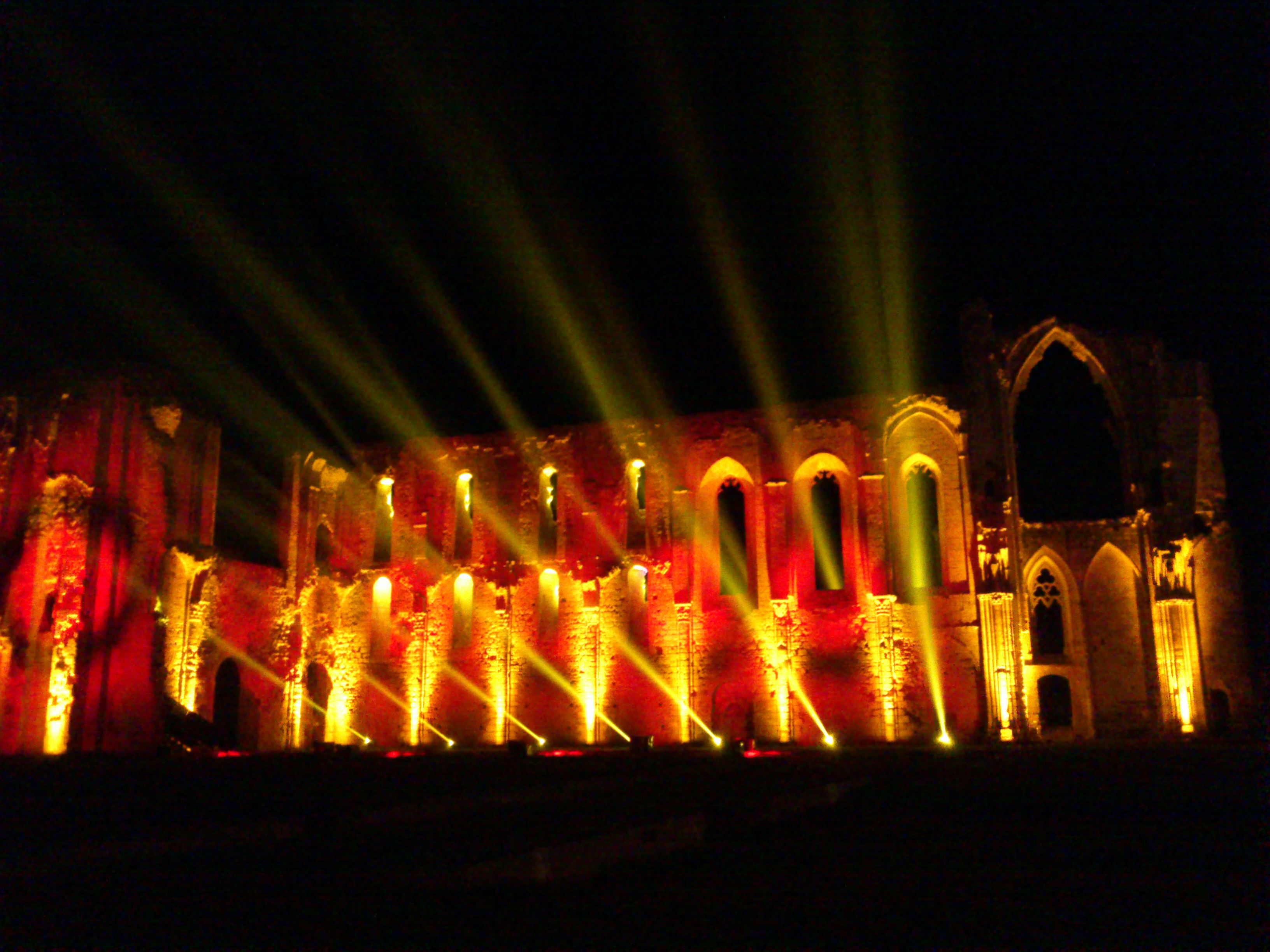 Abbaye de Maillezais, illuminations de Noel